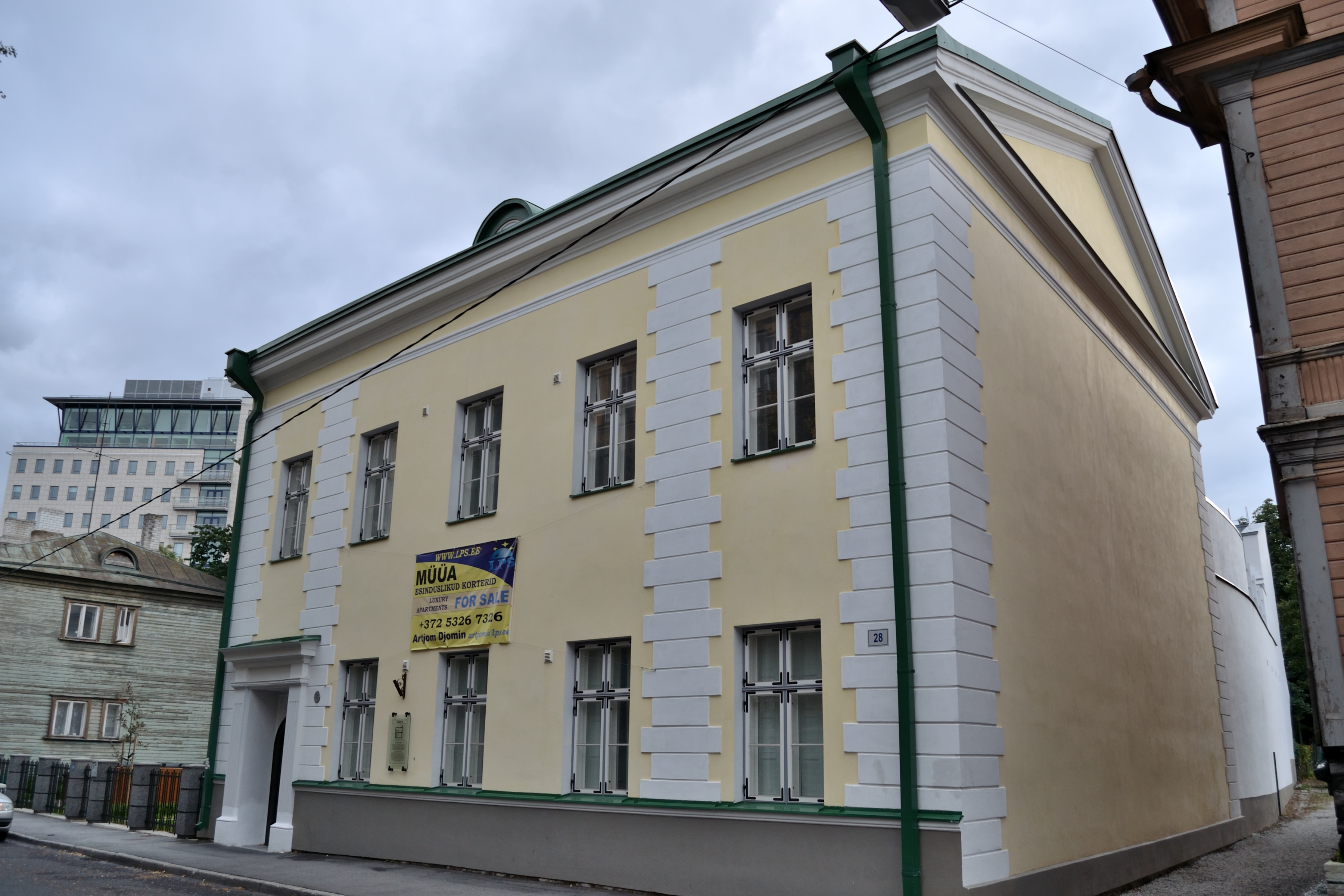 Tallinn, elamu Tatari 28